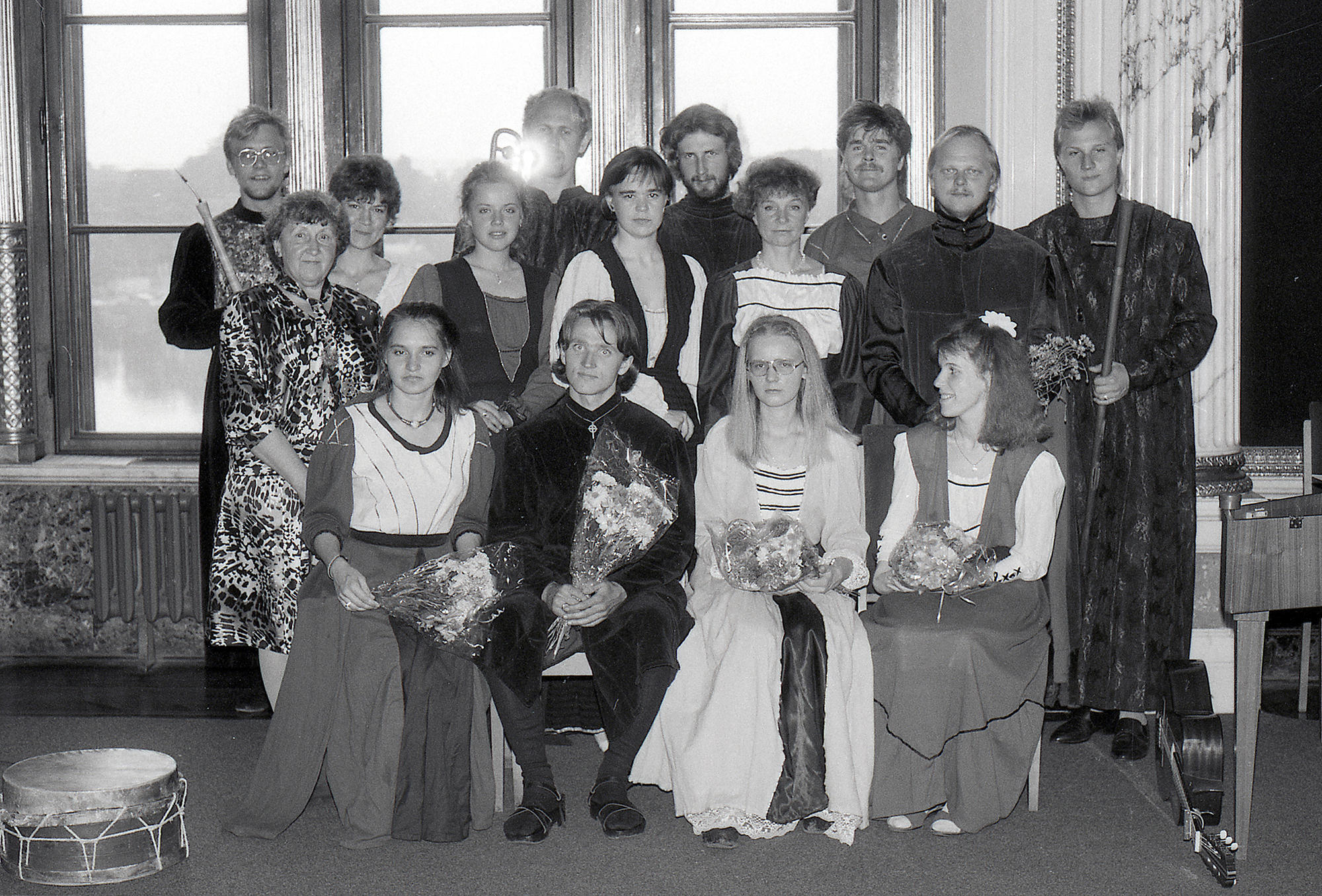 Viljandi Linnakapell esimene vanamuusikaansambel Schwerins 90